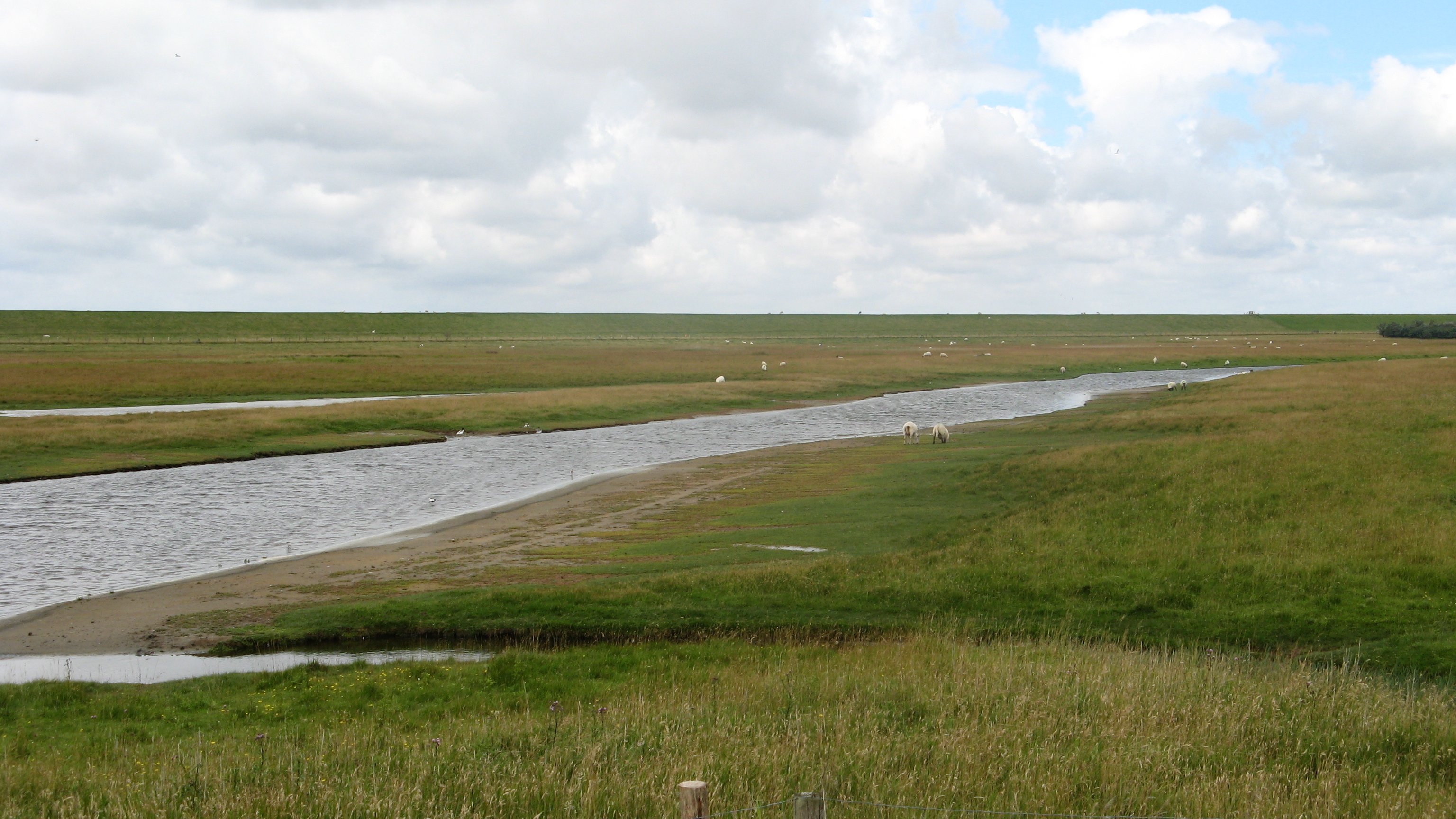 Ehemaliger Priel, jetzt Entwässerungskanal im Dithmarscher Speicherkoog